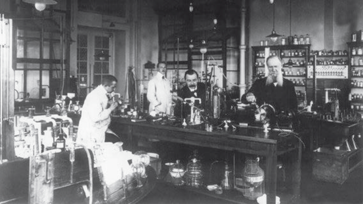 Ernst Otto Beckmann (* 4. Juli 1853 in Solingen; † 13. Juli 1923 in Berlin) im KWI für Chemie